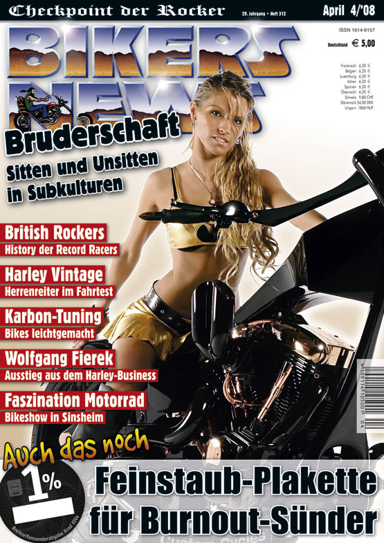 BIKERS NEWS Cover 4/08